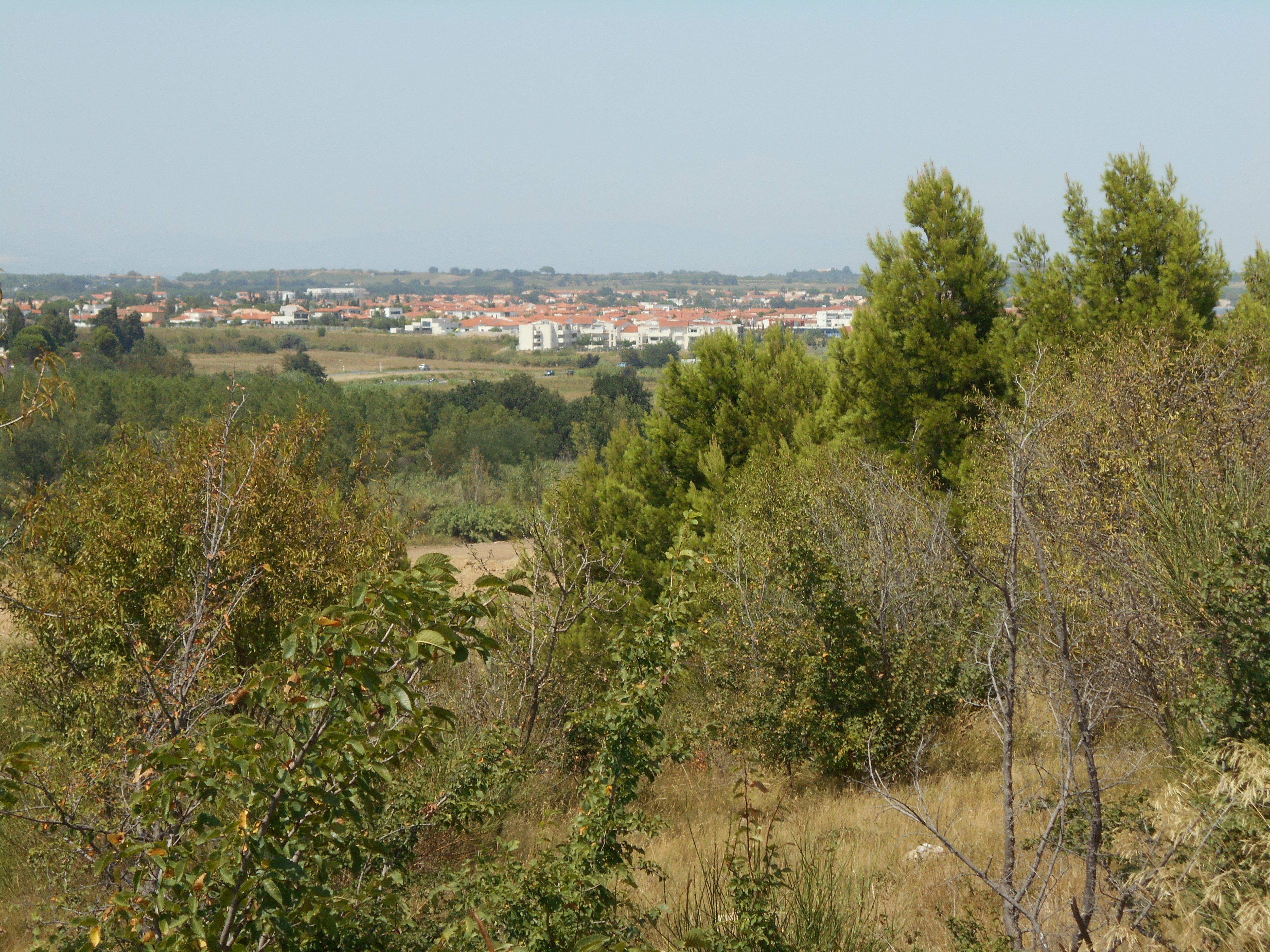 Vista general de Bages de Rosselló des del Castell del Reart